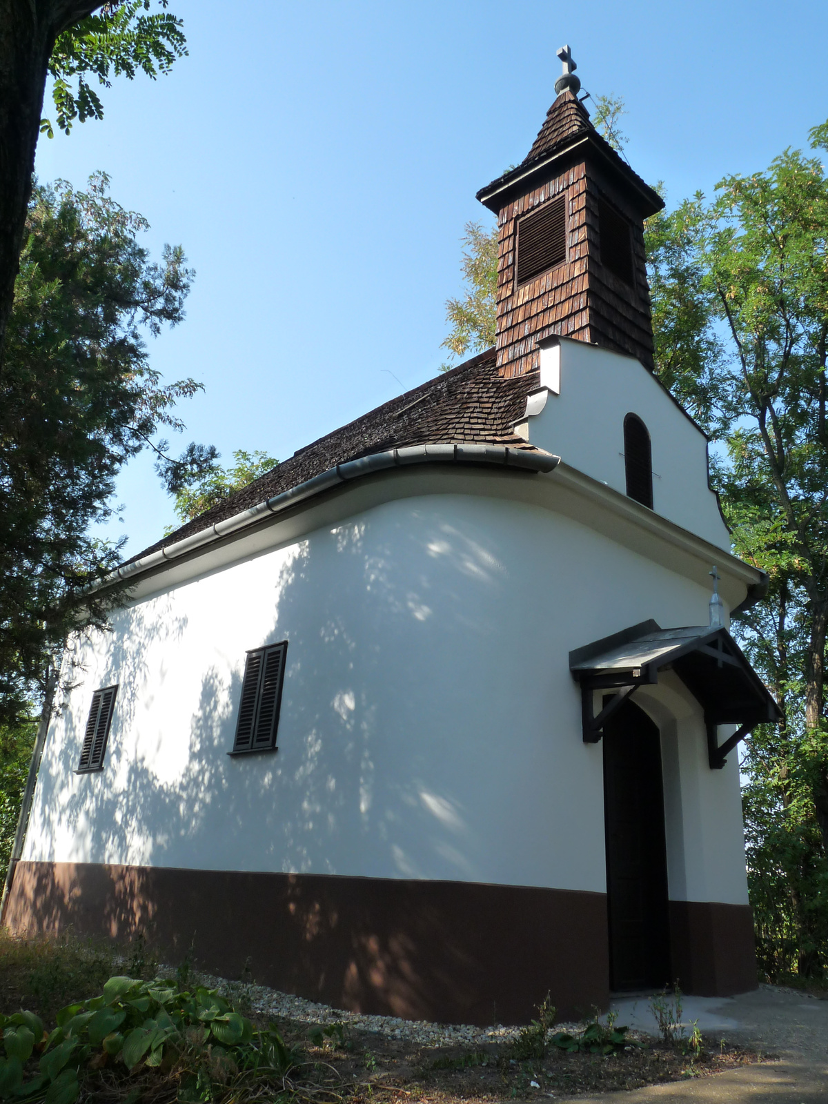 Gör. kat. kápolna (Sarlós Boldogasszony-kápolna) (Szolnok, Nyíl u.) This is a photo of a monument in Hungary. Identifier: 6049